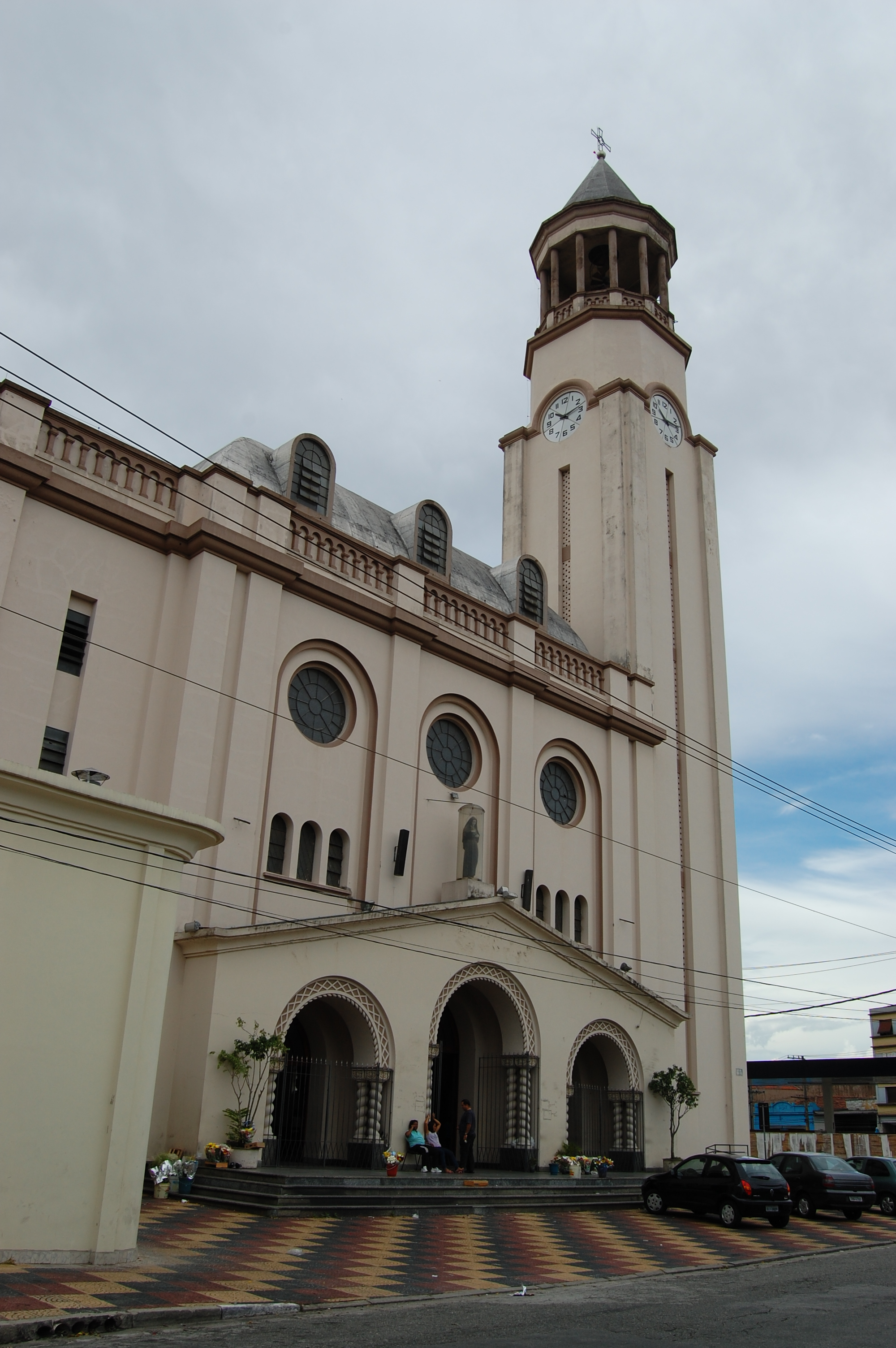 Igreja Santa Rita de Cássia do Pari, São Paulo, Brasil.